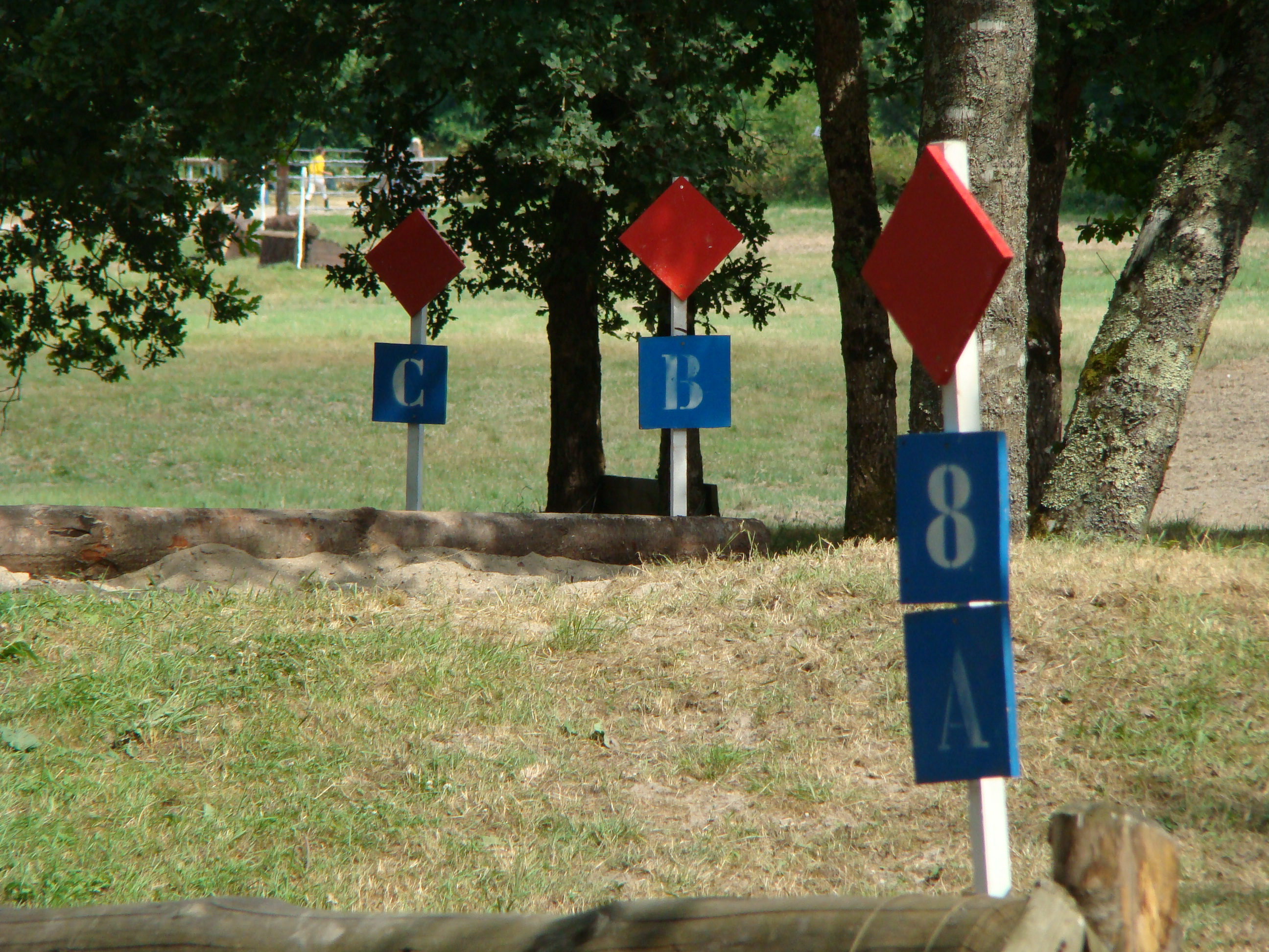 picture taken at 2008 generali opn de france 2008